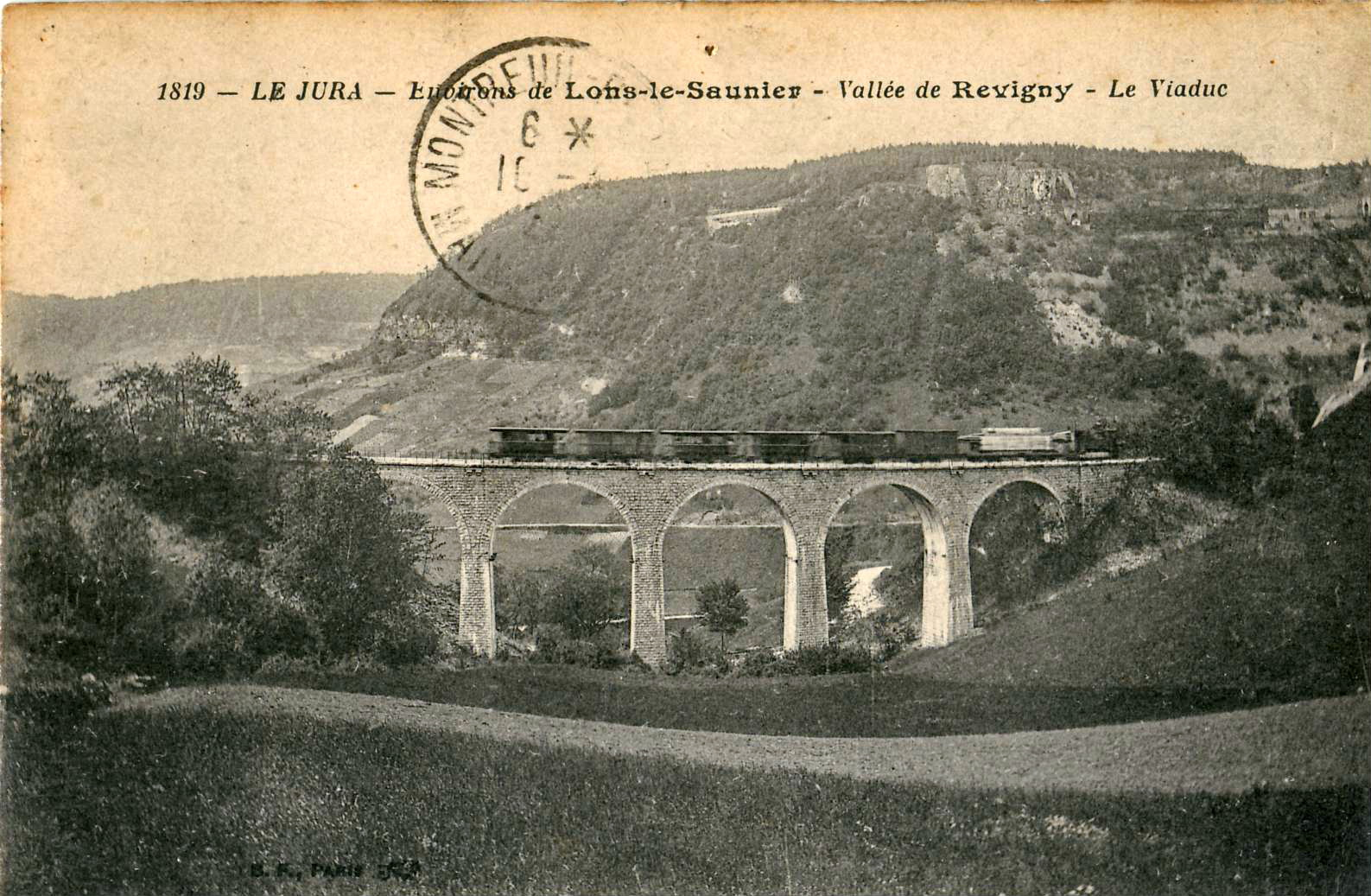 Carte postale ancienne éditée par BF à Paris, collection Environs de Lons-le-Saulnier, n°1819 : Vallée de Revigny - Le Viaduc